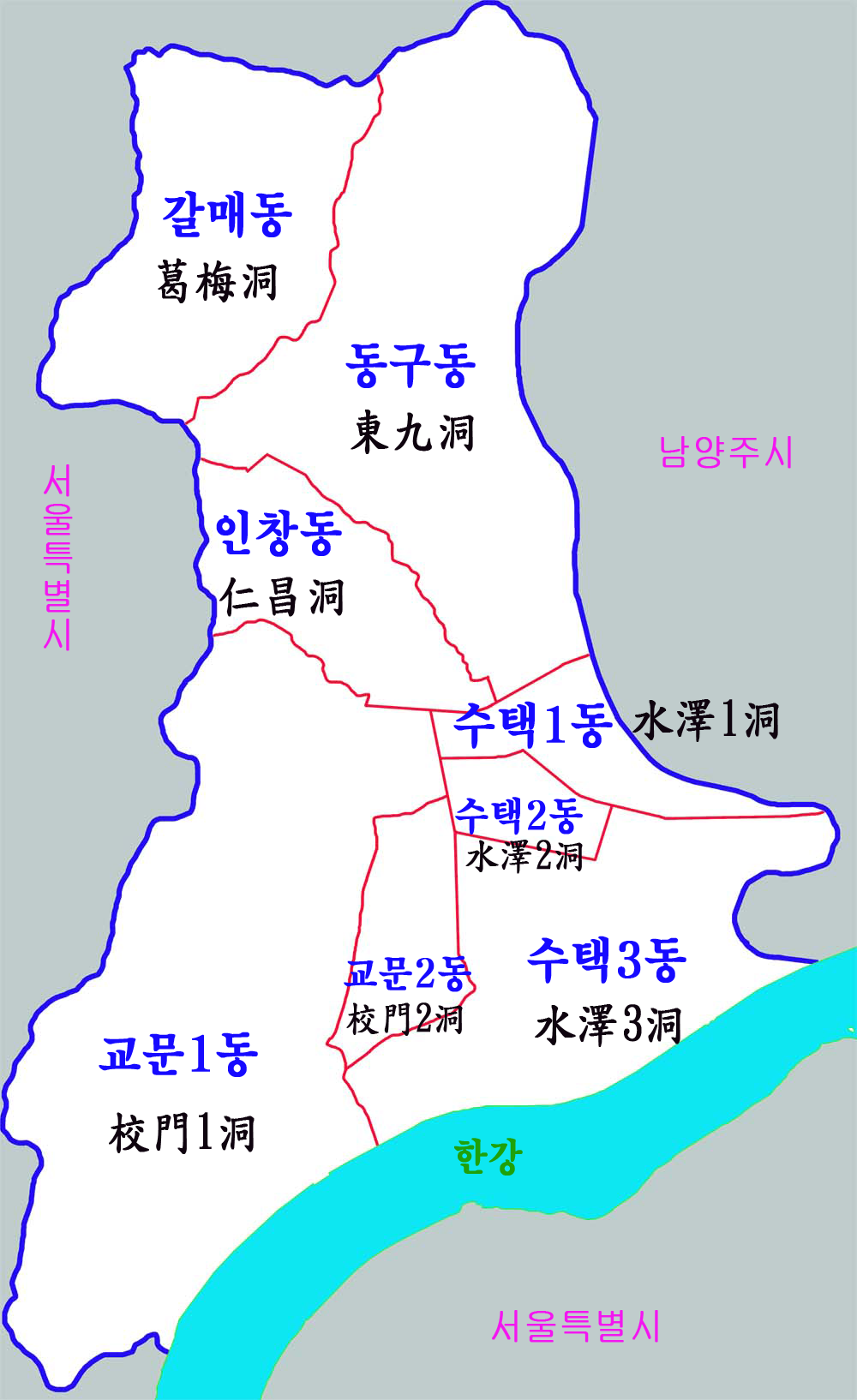 경기도 구리시 행정구역도